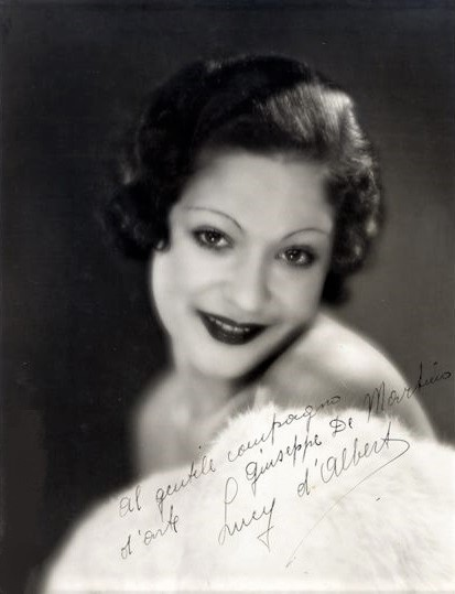 Lucy D'Albert